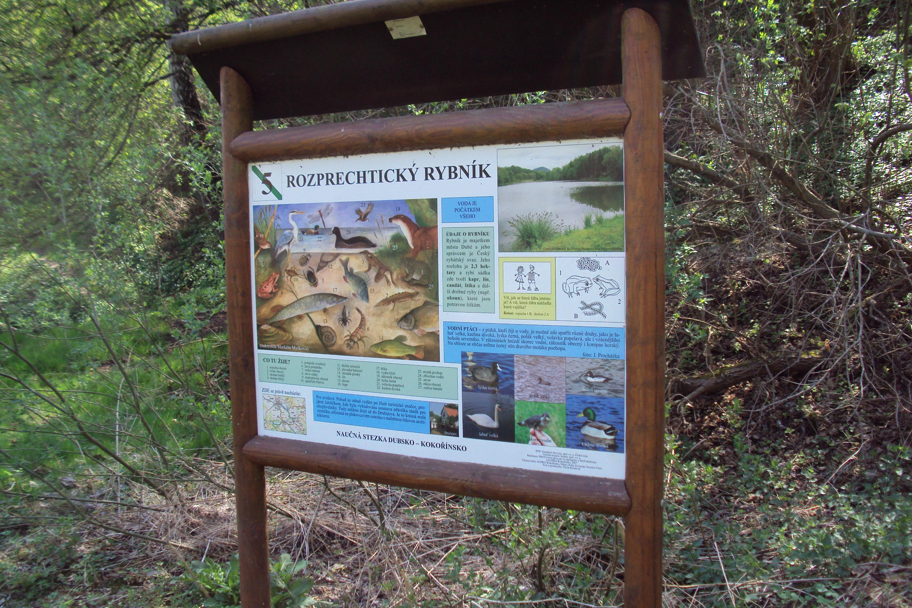 Tablo naučné stezky u Rozprechtického rybníka